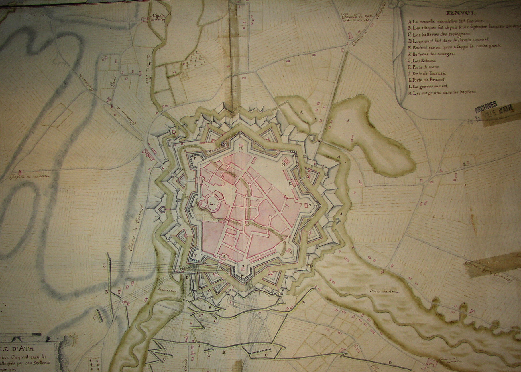 Plan des fortifications d'Ath par Vauban en 1707